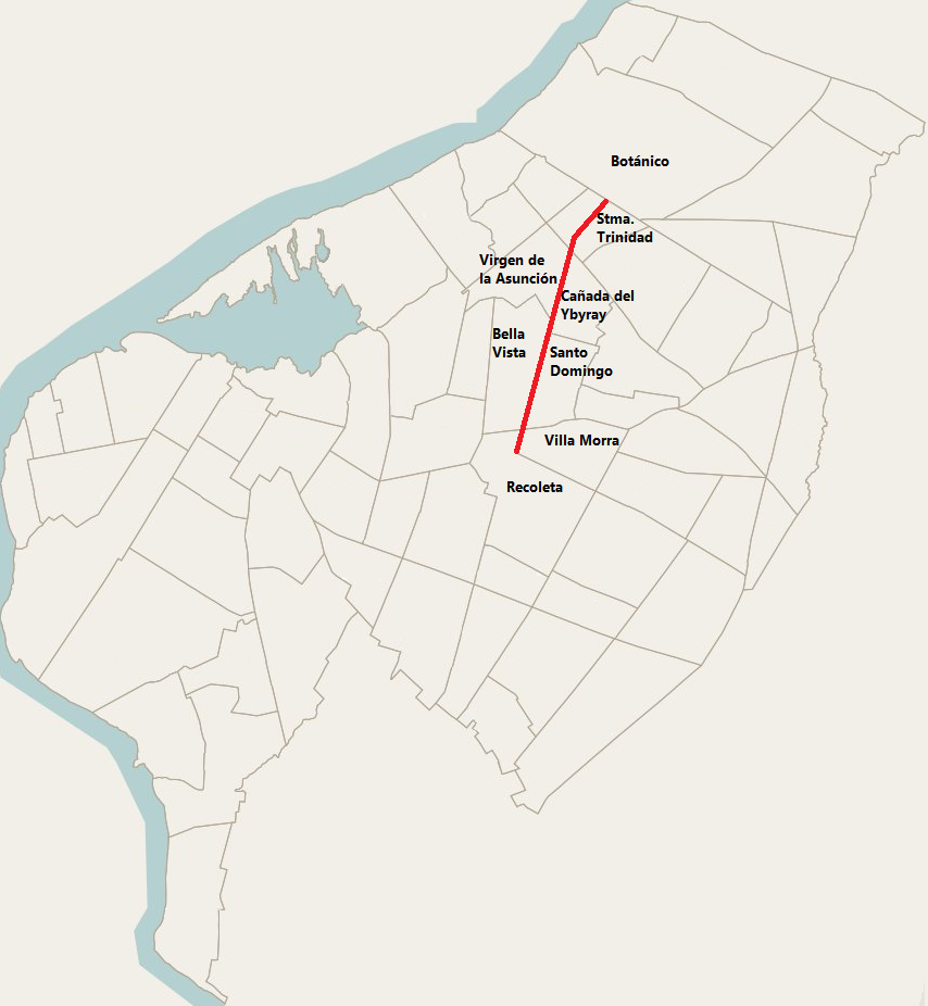 Mapa de la Avda. Santisimo Sacramento en Asunción, Paraguay